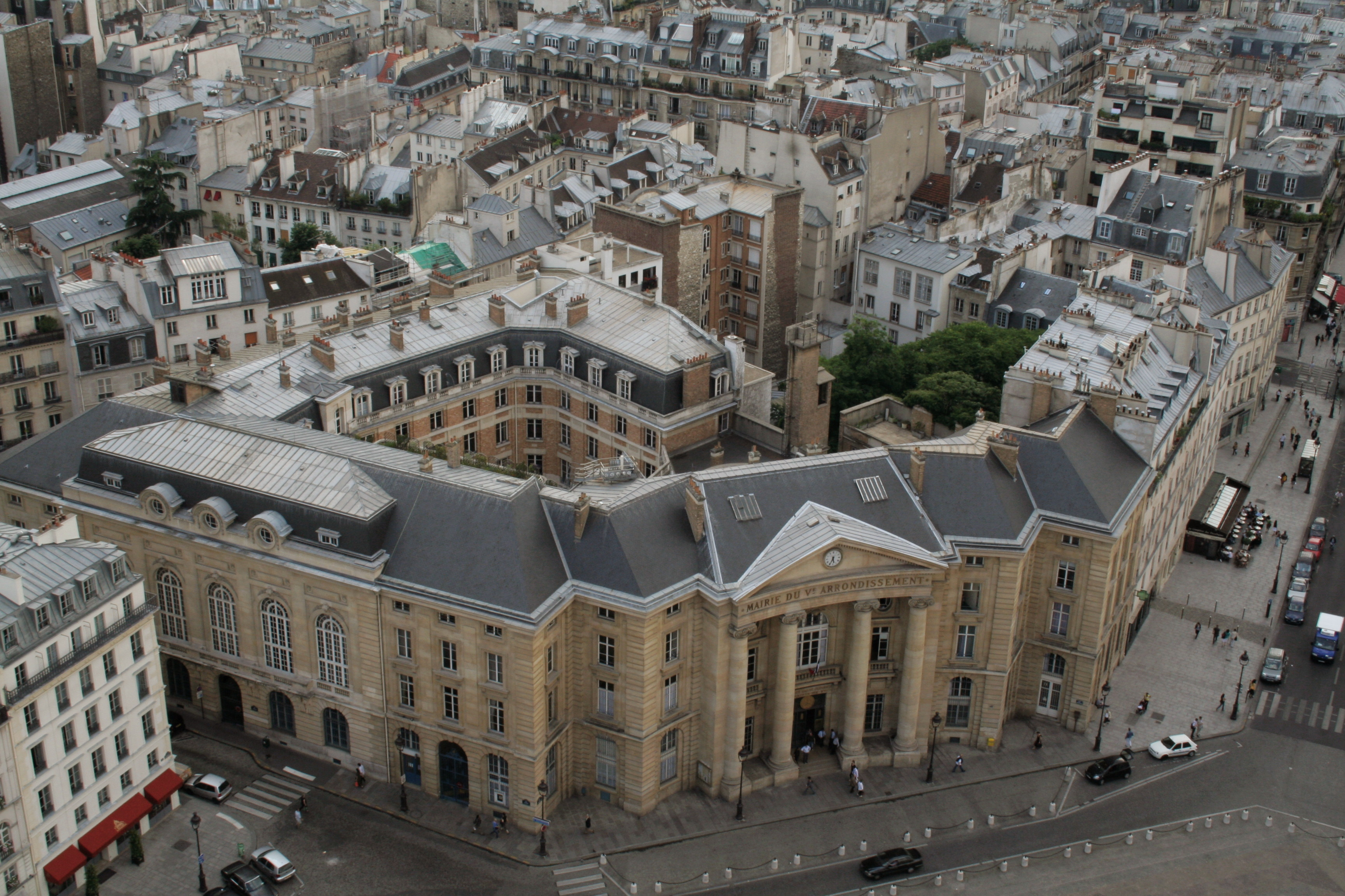 Mairie du cinquième arrondissement de Paris vu depuis le Panthéon.